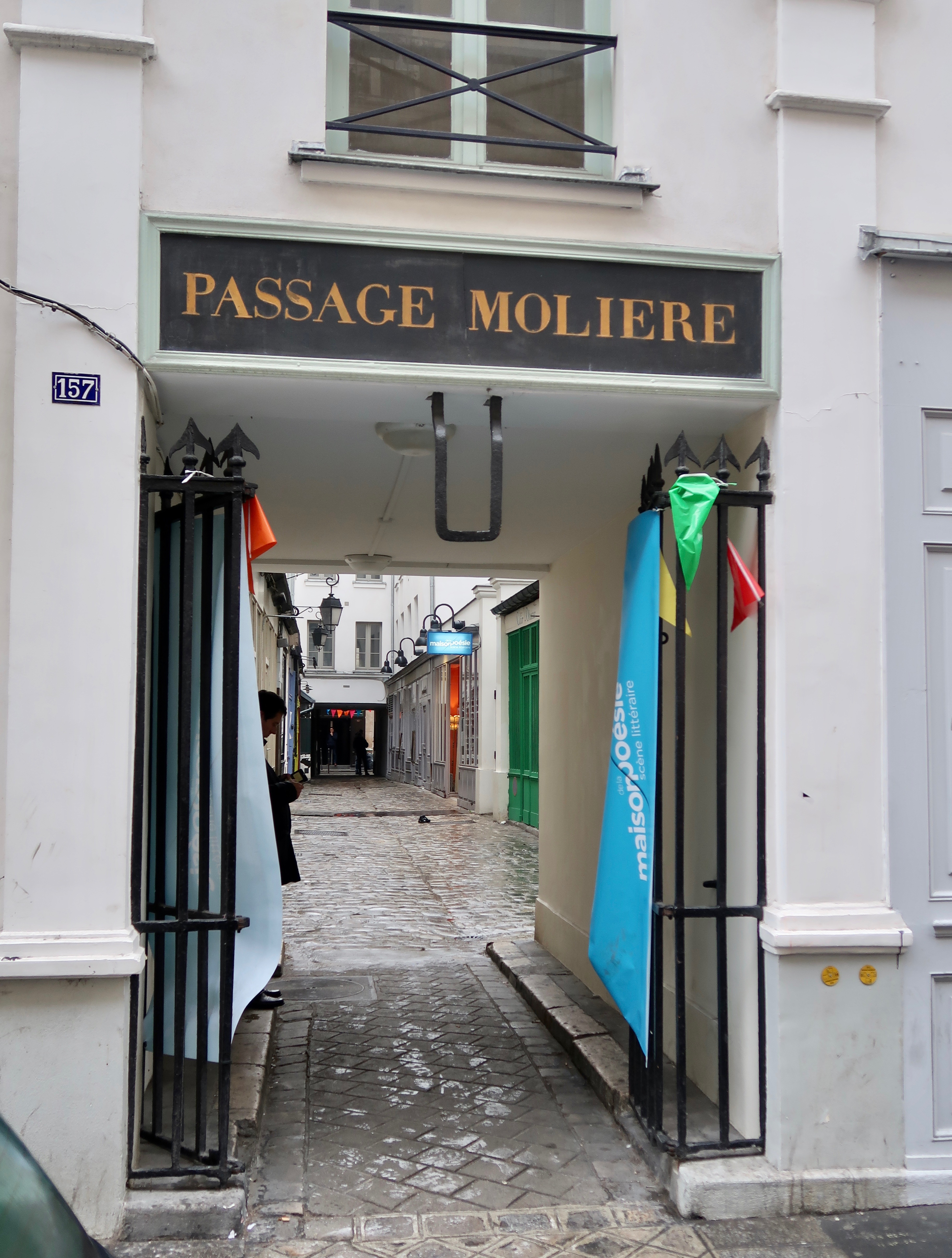 Passage Molière, 157 rue Saint-Martin (Paris, 3e).